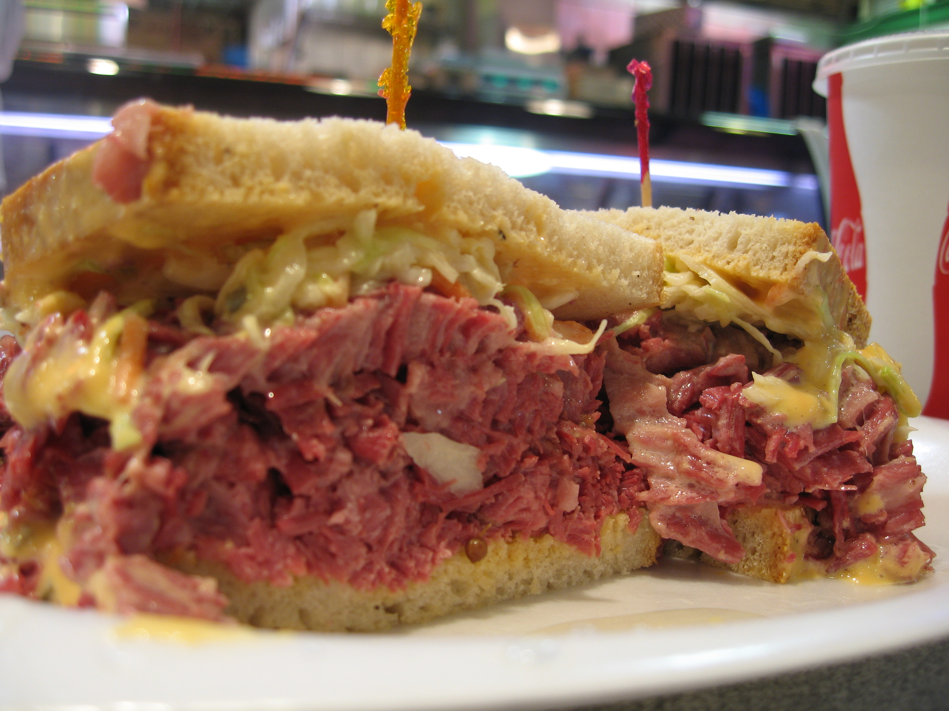 Corn beef Reuben sandwich